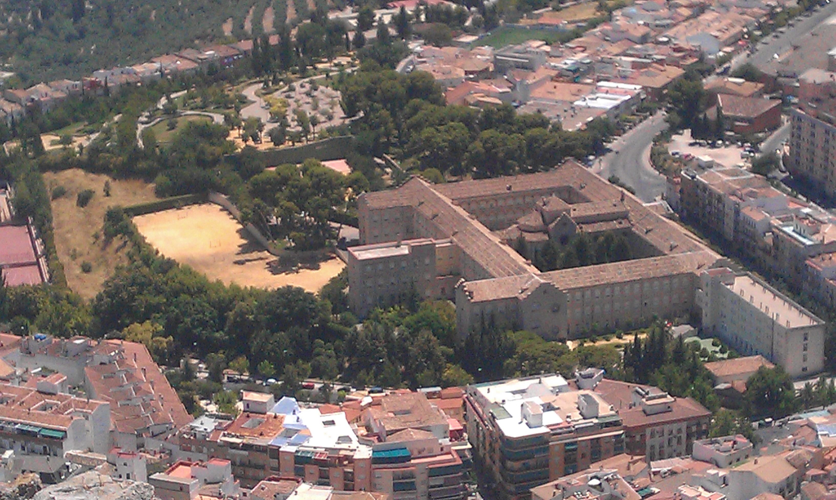 Vista del seminario diocesano de Jaén desde el Castillo de Santa Catalina.